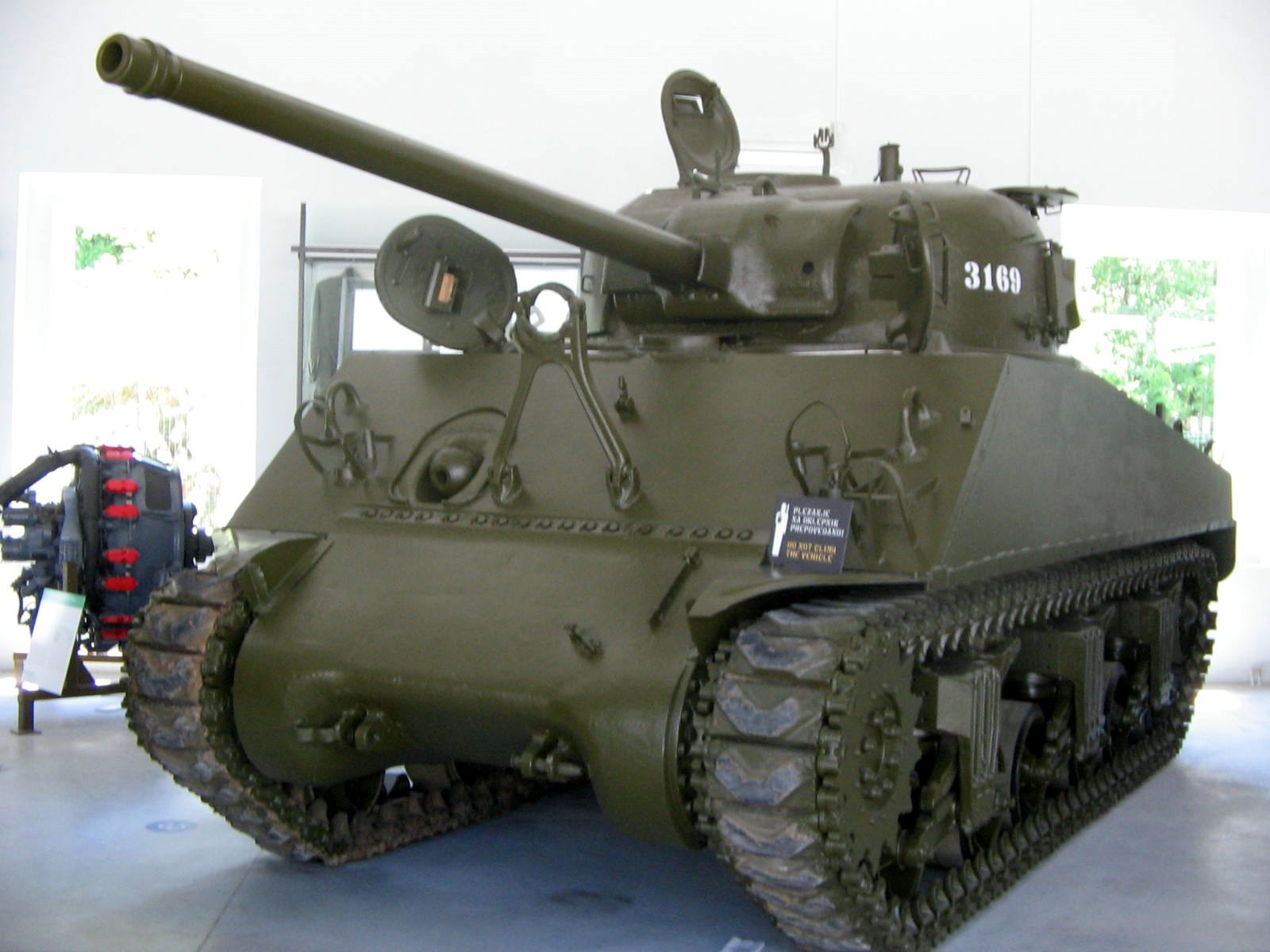 Park of Military History, Pivka, Slovenija